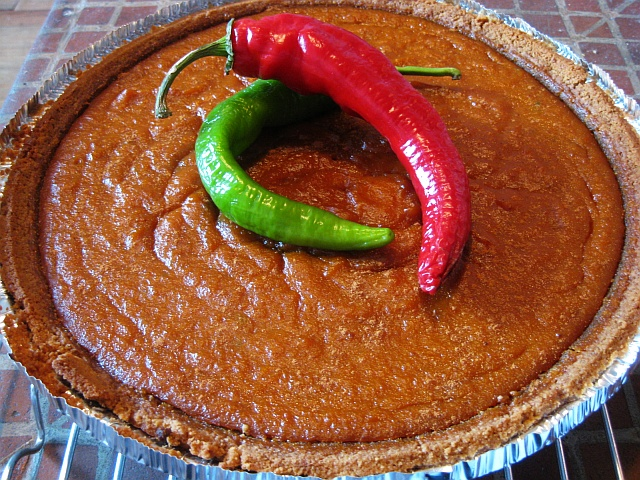 my chili pumpkin pie.